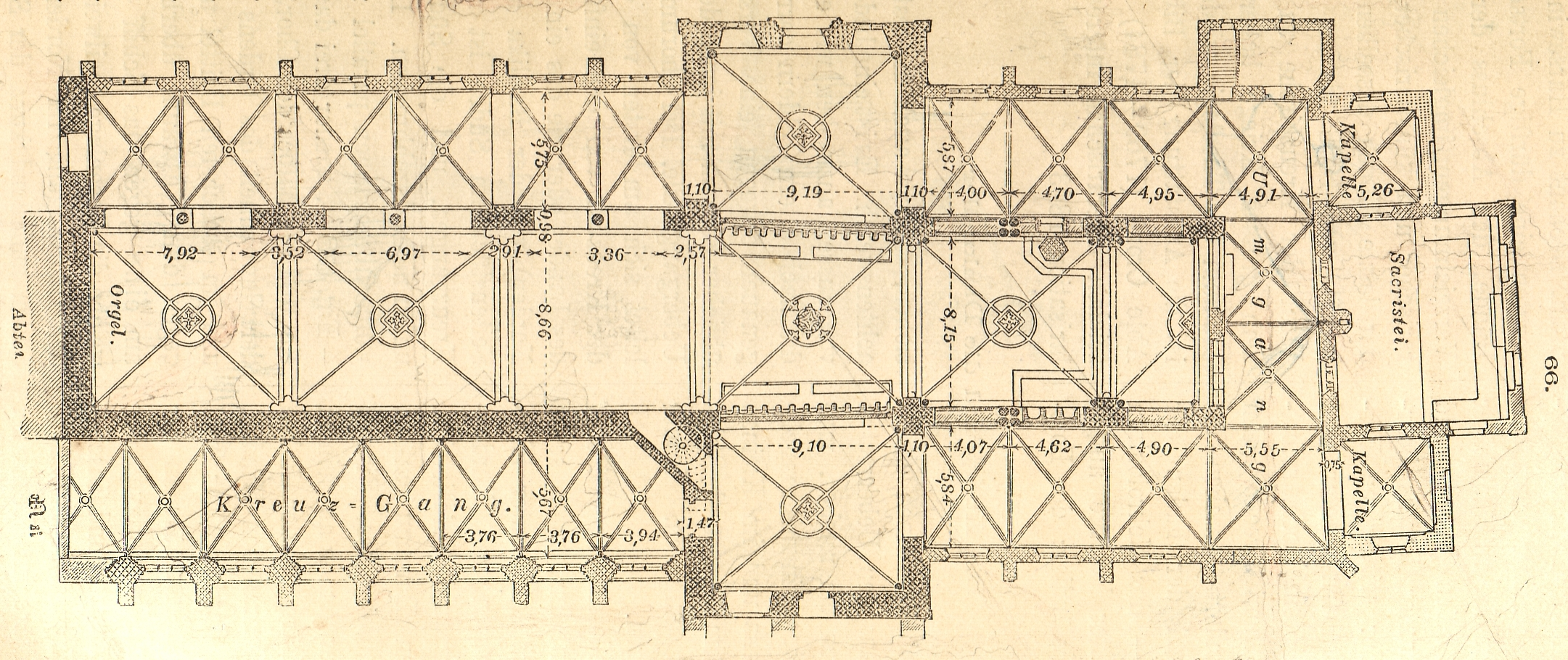 Kloster Marienfeld